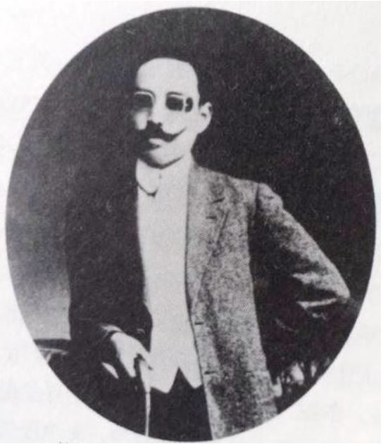 韩国独立运动创始人之一申圭植